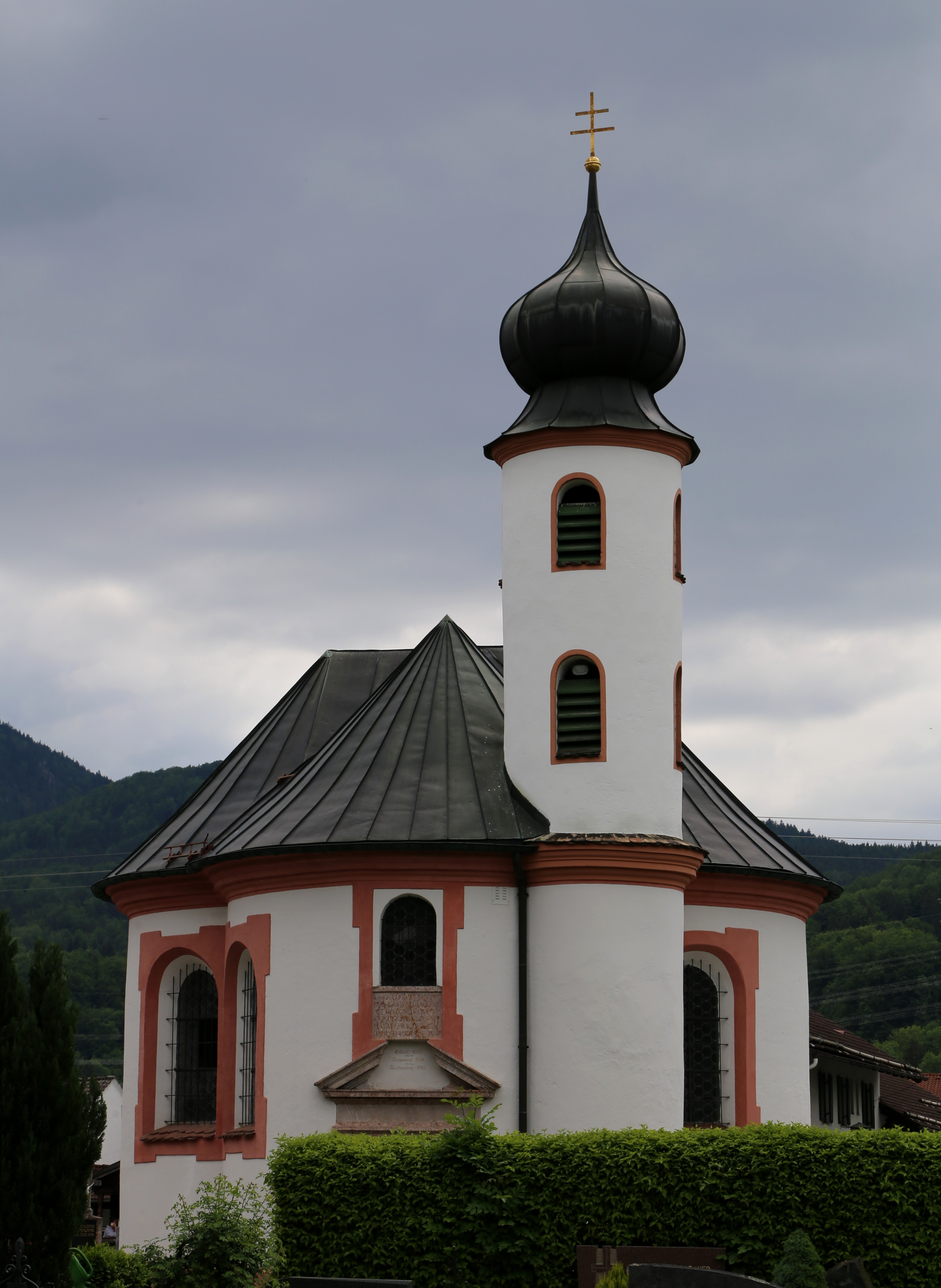 Kocheler Straße 15; Friedhofskapelle Heiliges Kreuz, barocker vierkonchiger Zentralbau mit Zwiebelturm, 1693; mit Ausstattung